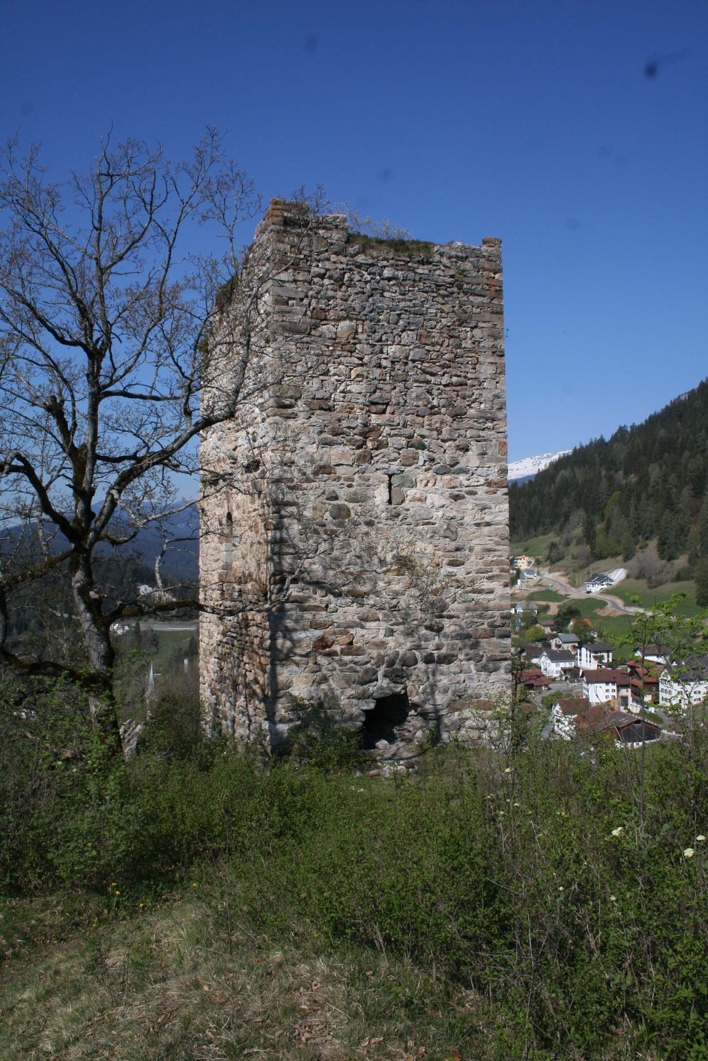 Ostseite